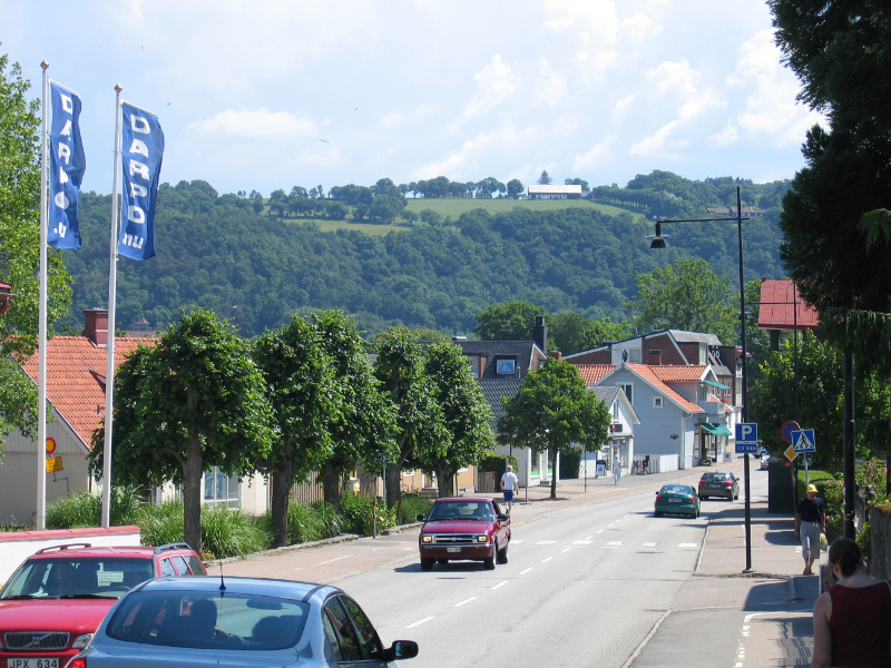 Hallandsåsen seen from a street in Båstad, Skåne, Sweden Photo taken by User:Abelson in July 2005